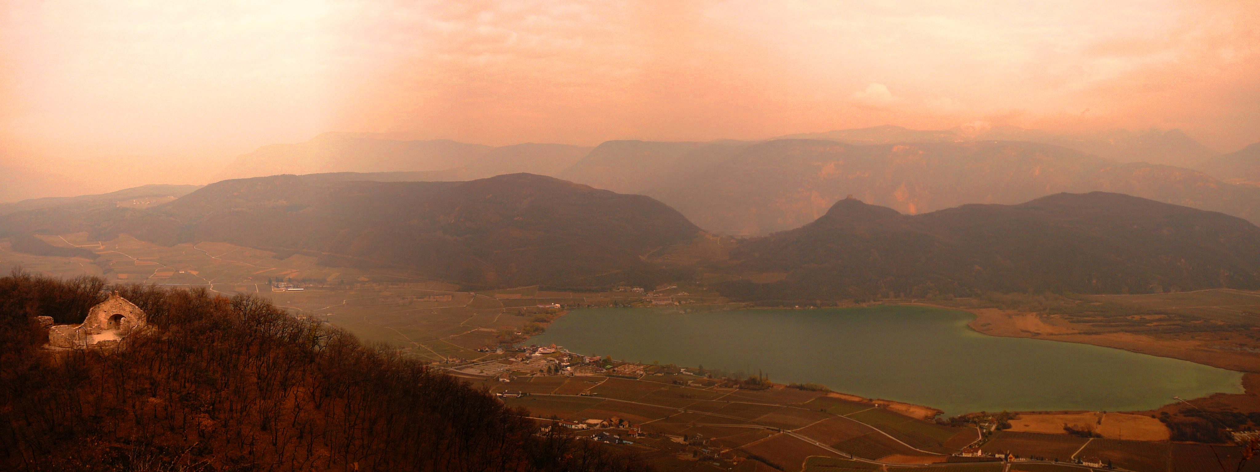 Il lago di Caldaro e il castechiro